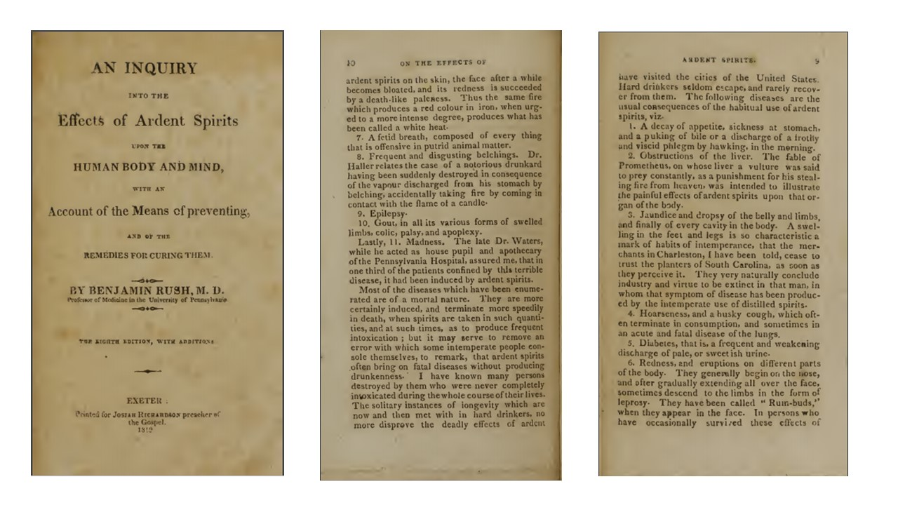 Frontespizio dell'opera Effects of Ardent Spirits upon the Human Body and Mind di B. Rush.